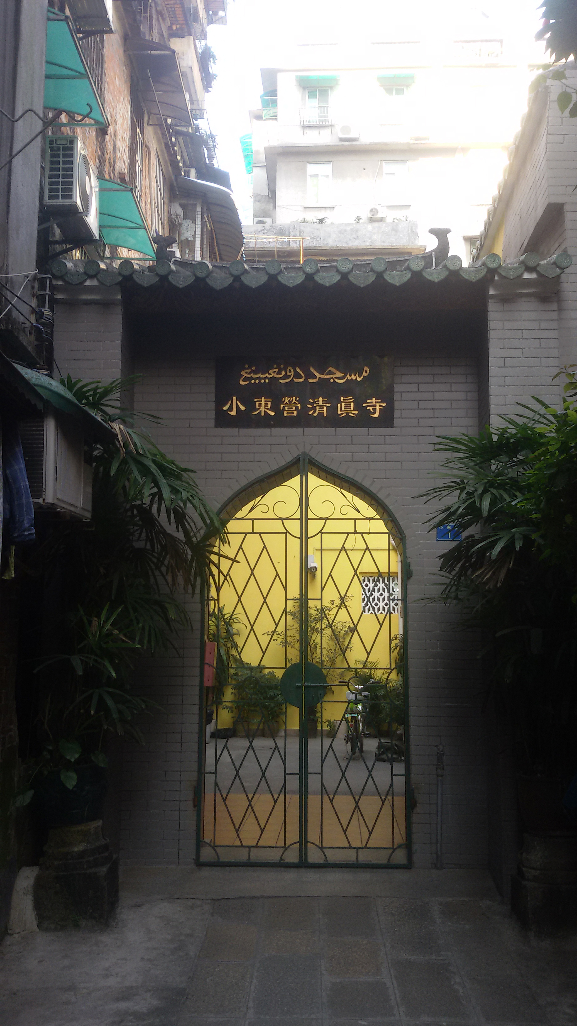 粵語: 小東營清眞寺